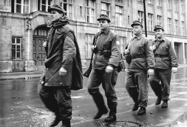 ADN-ZB-Stöhr-24.8.1961-Berlin: Kampfgruppen während ihres Einsatzes zur Durchsetzung der Grenzsicherungsmaßnahmen der DDR vom 13.8.1961. - Auf dem Wege zur Postenablösung.